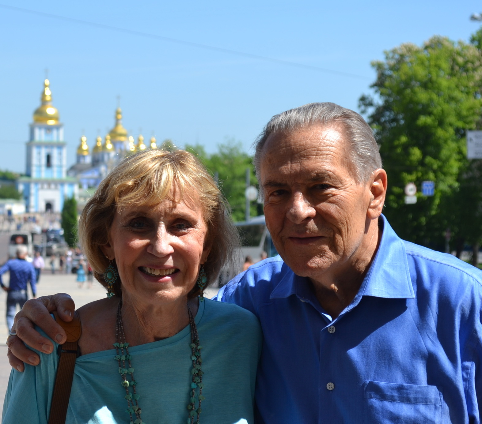 2013 рік. Сім'я Грофів вперше в Україні.